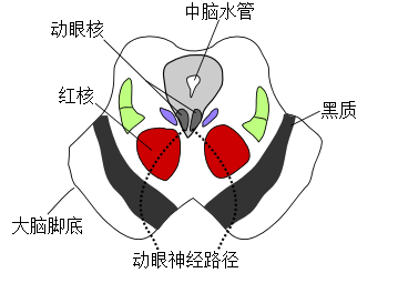 人体中脑上丘横切面一部分，显示了每个动眼神经从其细胞核到眼睛的大致路径。图片的底部为头部的前部。